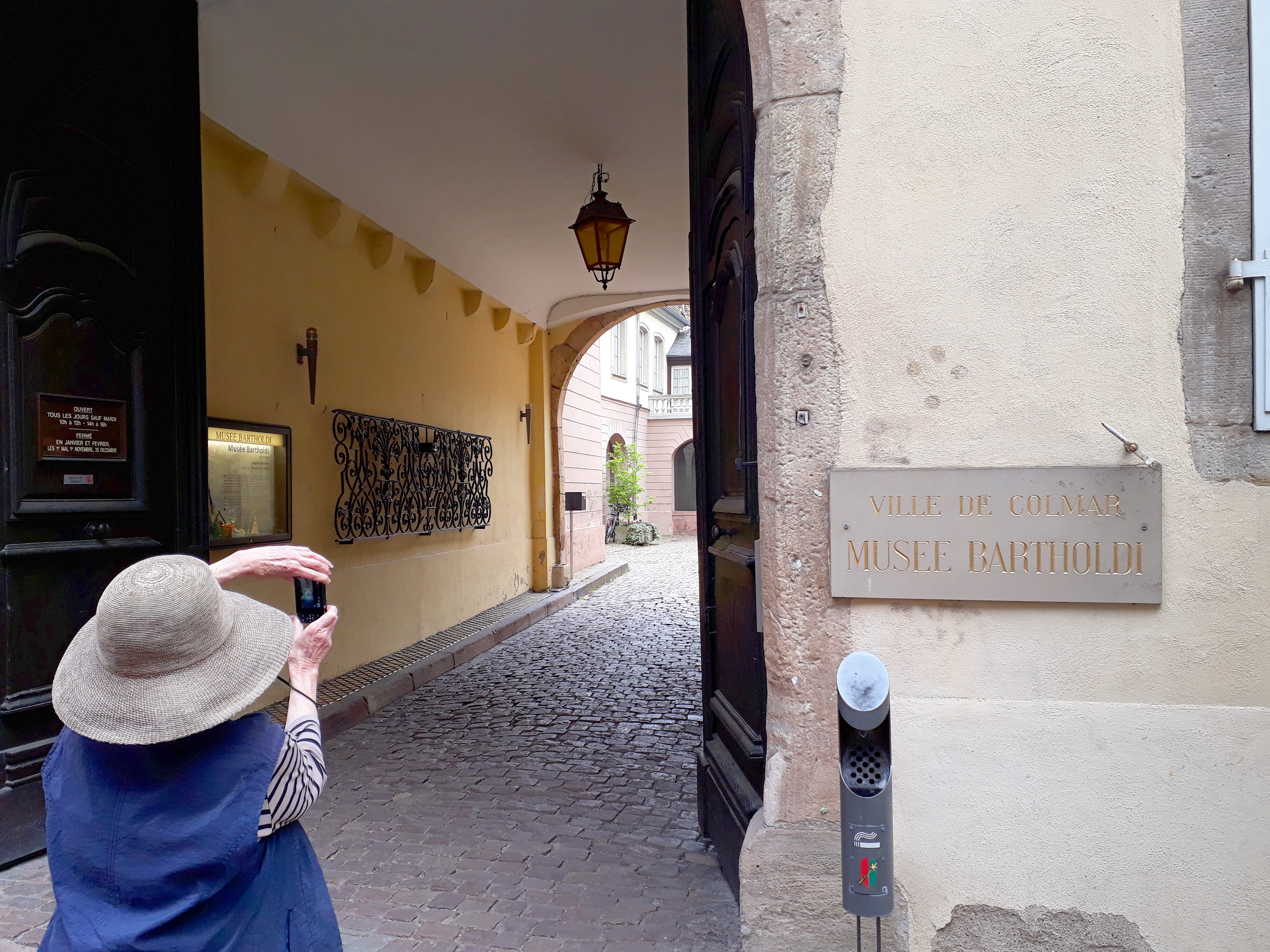 Entrée du musée Bartholdi, à Colmar